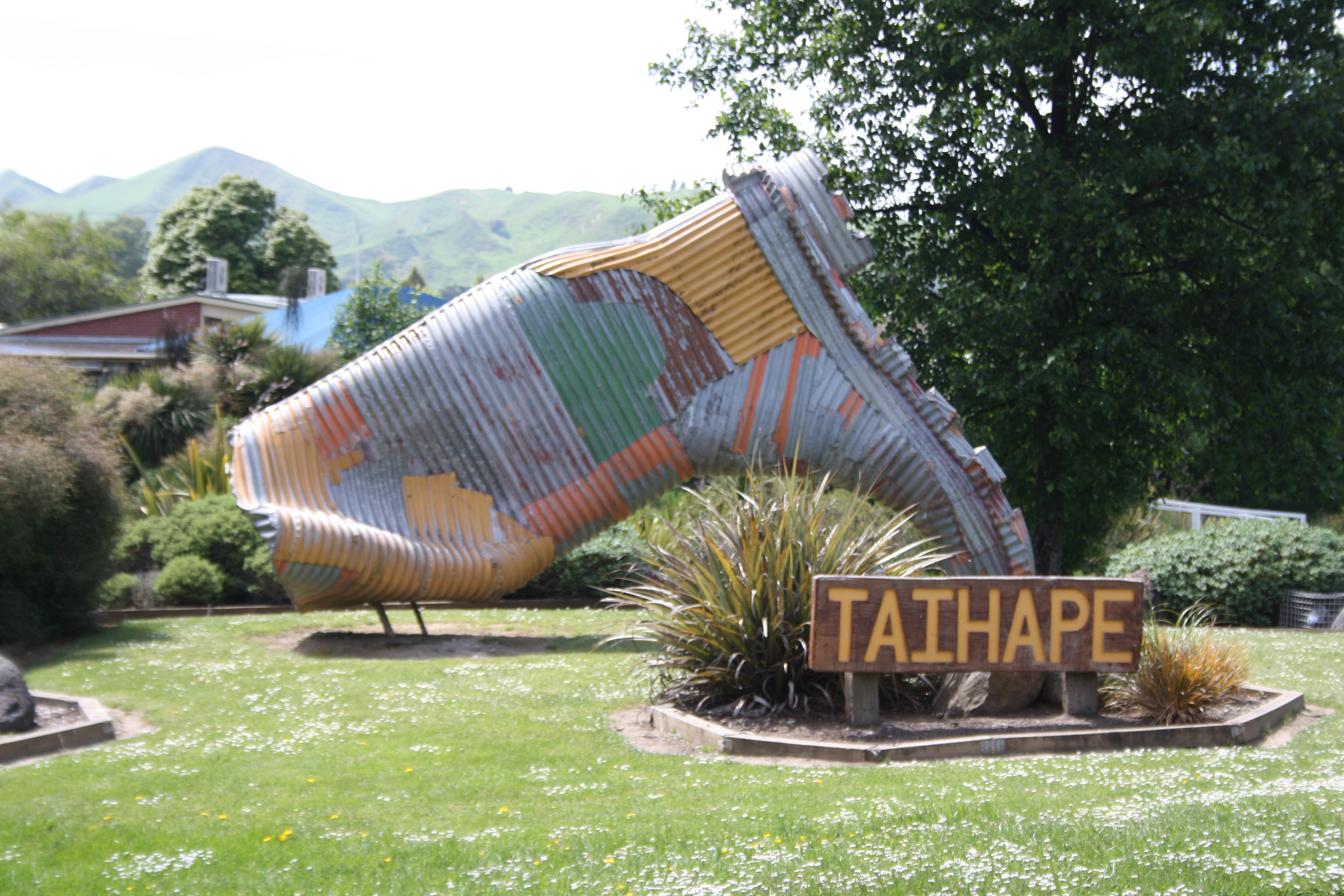 Ortseingang von Taihape, Neuseeland, mit Ortsschild und Gummistiefelskulptur, aufgenommen am 23. 11. 2016